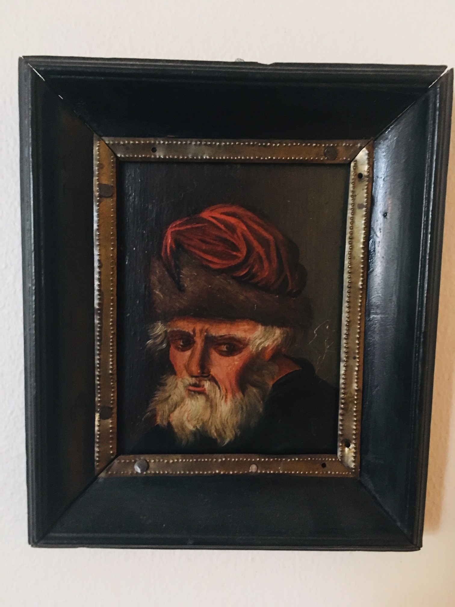 Adolph Tidemand, stillstudie. Første forsøk i olje fra 1832.